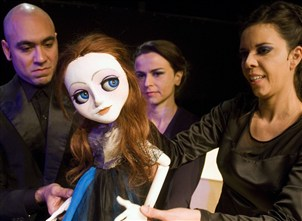 Valsa nº 6 peça de Nelson Rodrigues Companhia Teatro Portátil — em CCBB Rio de Janeiro.